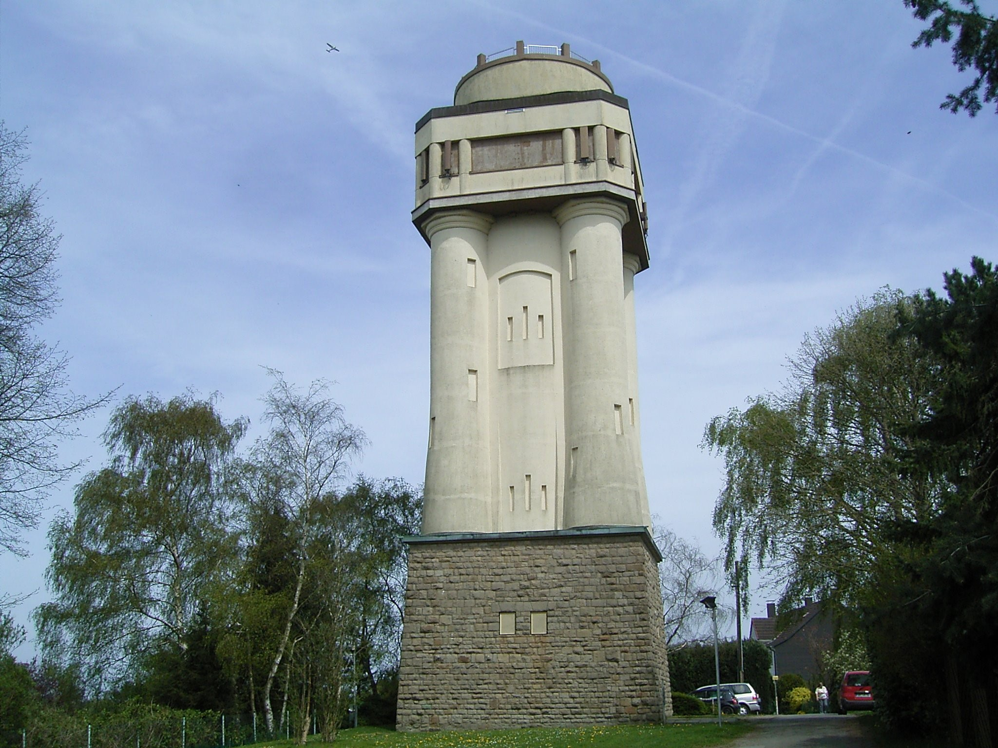 Wasserturm Bommerholz in Witten-Bommern